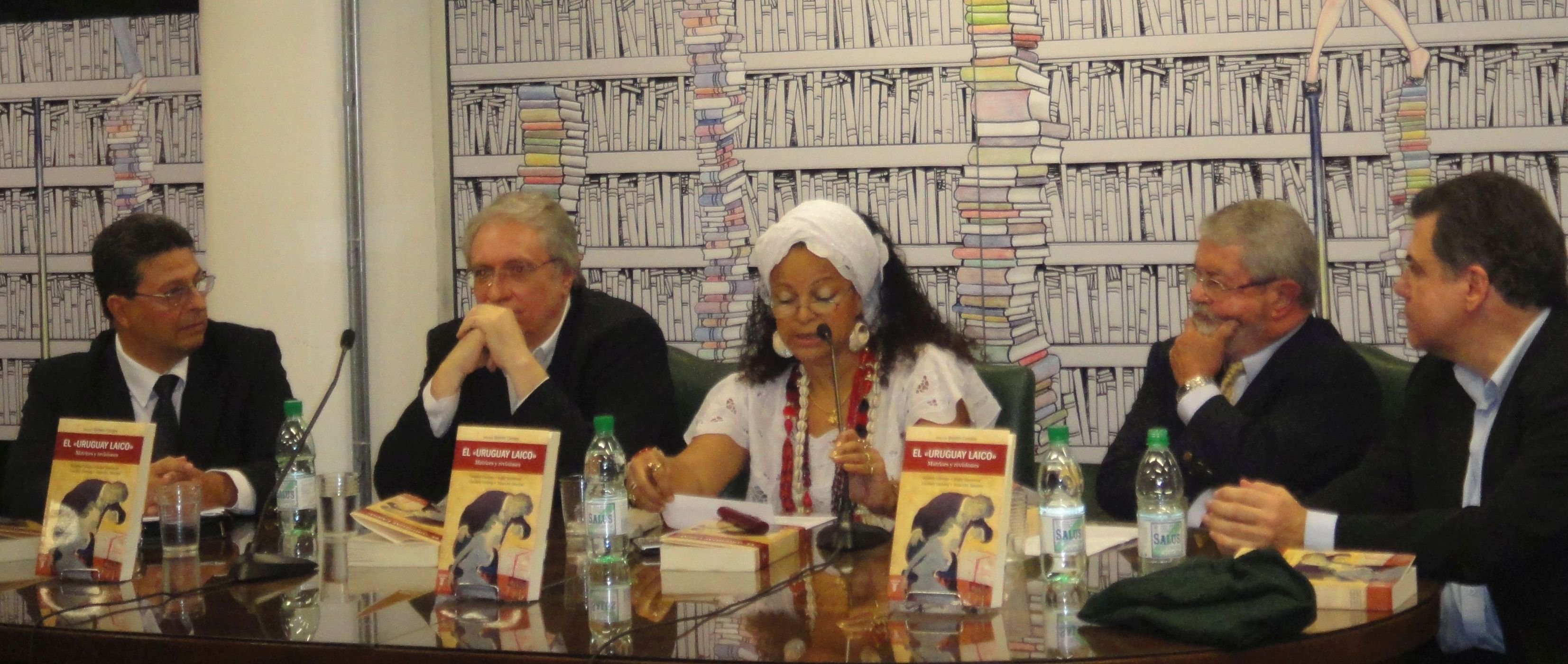 Sala Maestro Julio Castro Biblioteca Nacional